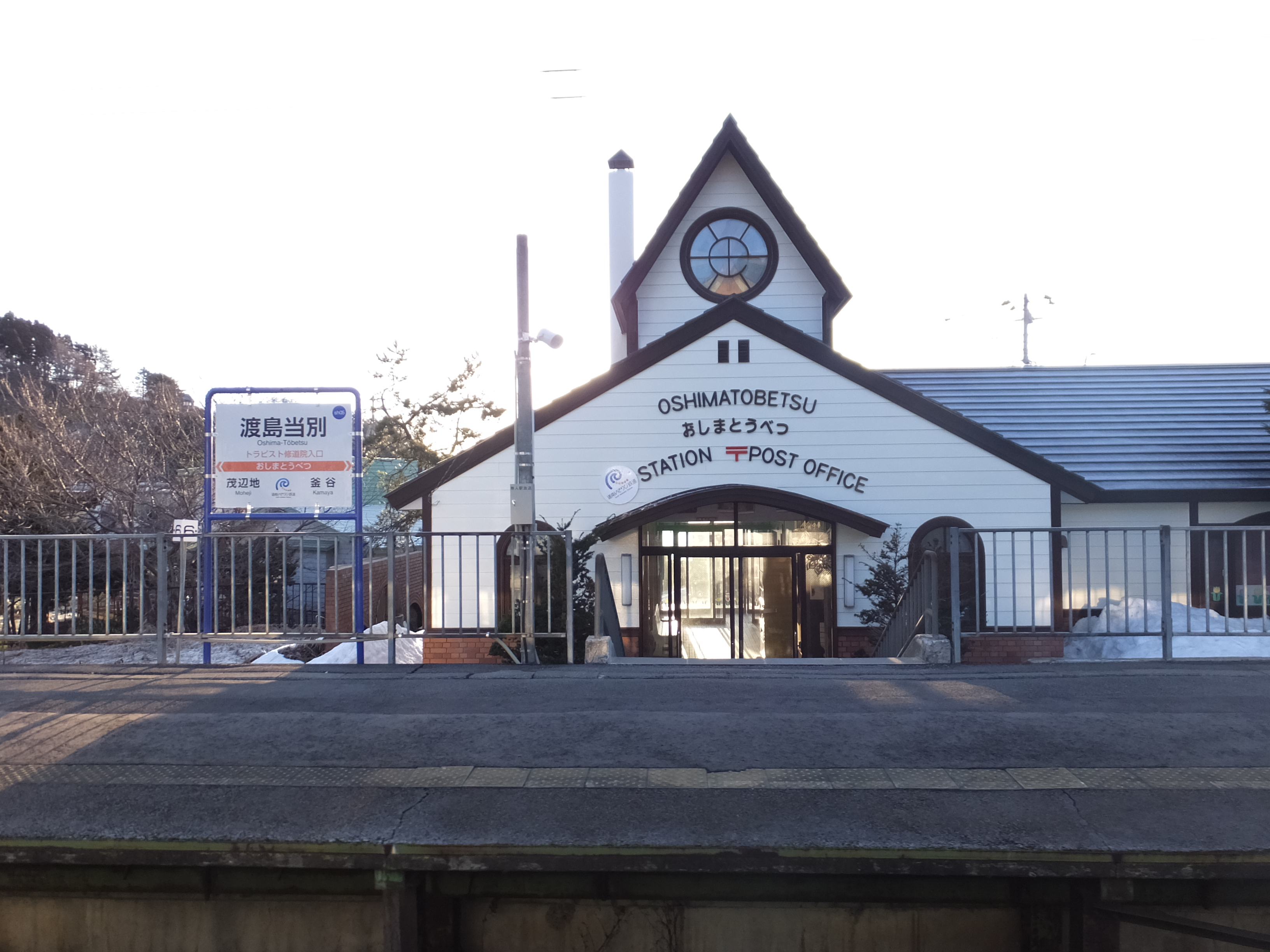 道南いさりび鉄道渡島当別駅1番ホーム 駅名標と駅舎